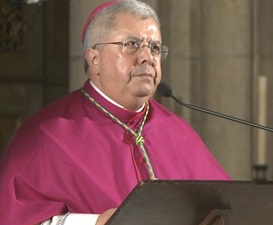 D. Joaquim Mendes, bispo titular de Caliábria e auxiliar de Lisboa